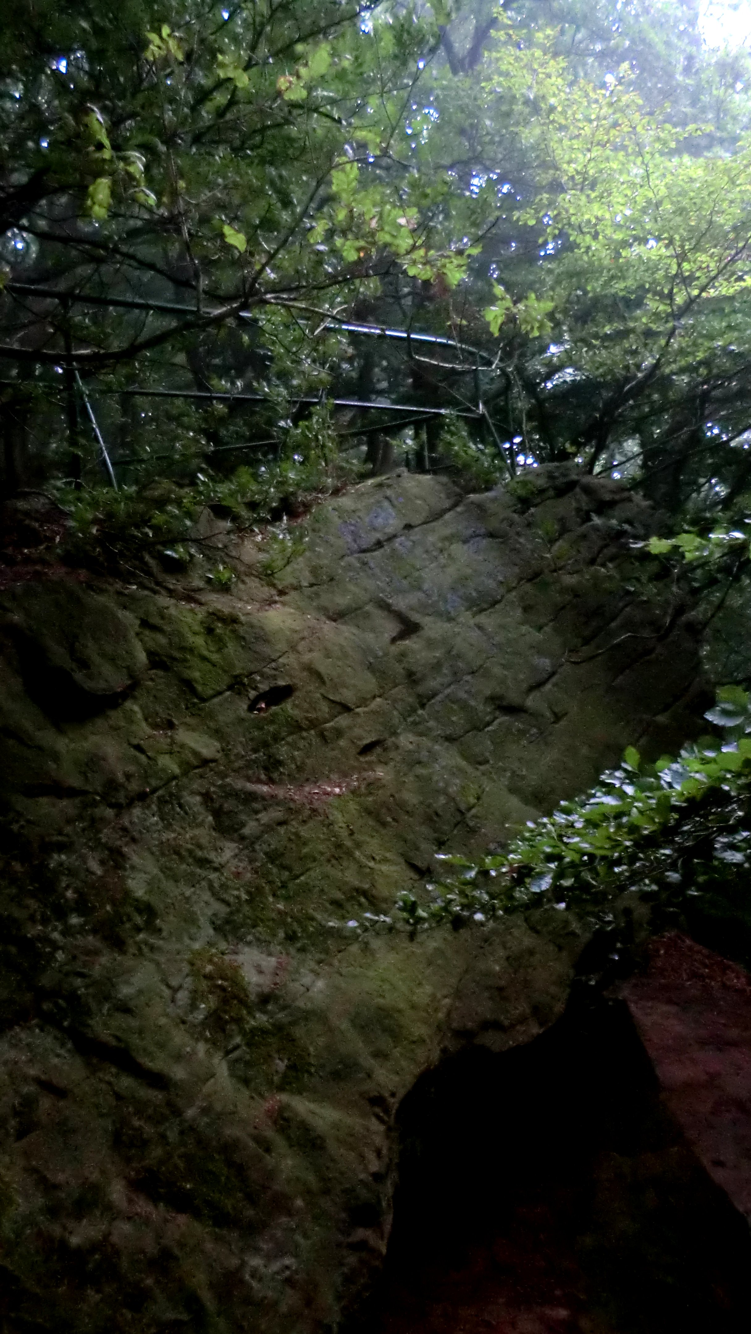 Zentraler Teil der Habichtswand mit dem Geländer an der Klippenkante, Häverstädter Berg im Wiehengebirge; Bereich im Naturschutzgebiet „Wittekindsberg“